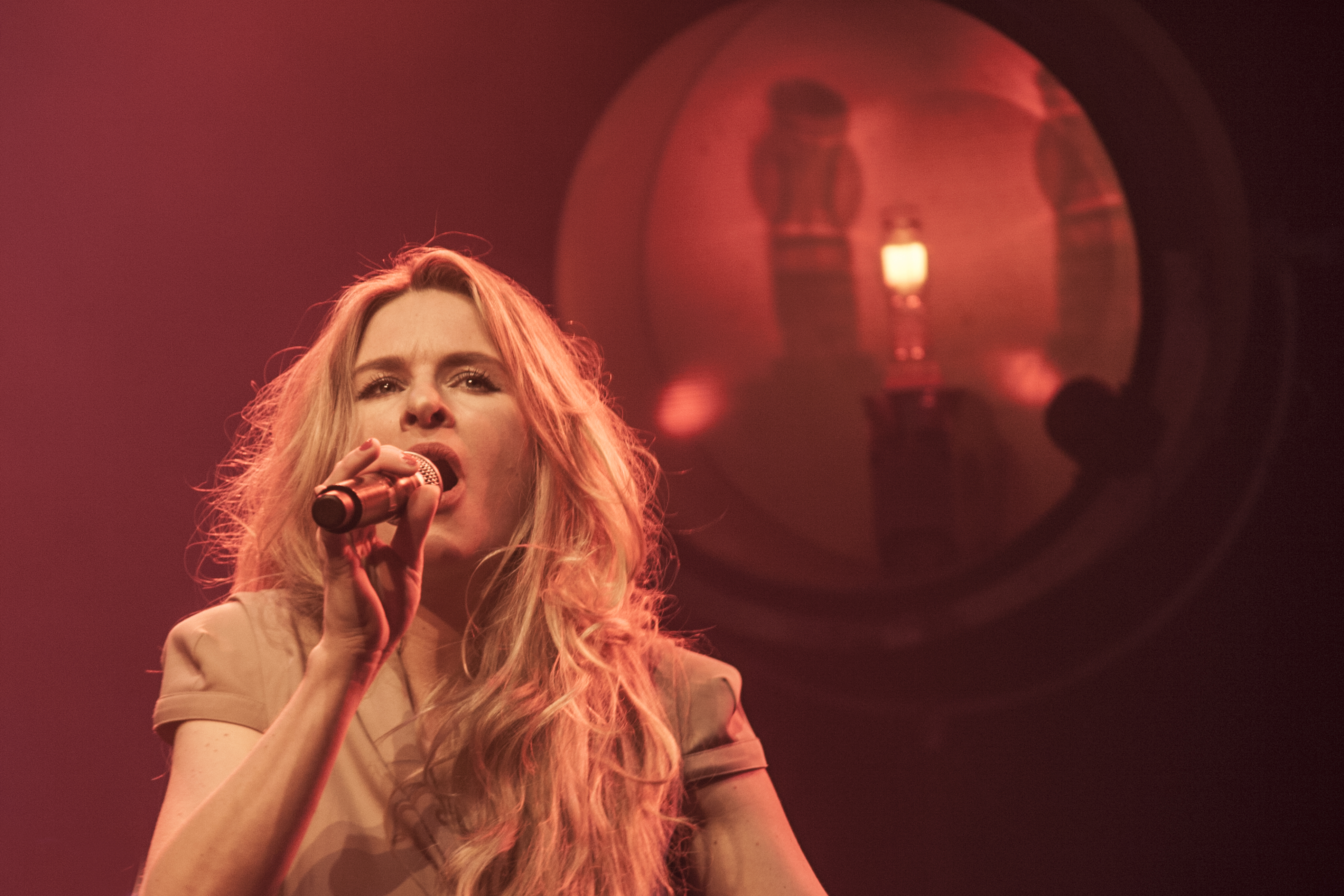 Sandra van Nieuwland tijdens haar 'And More' Tour in de Vorstin in Hilversum op 6 april 2013.